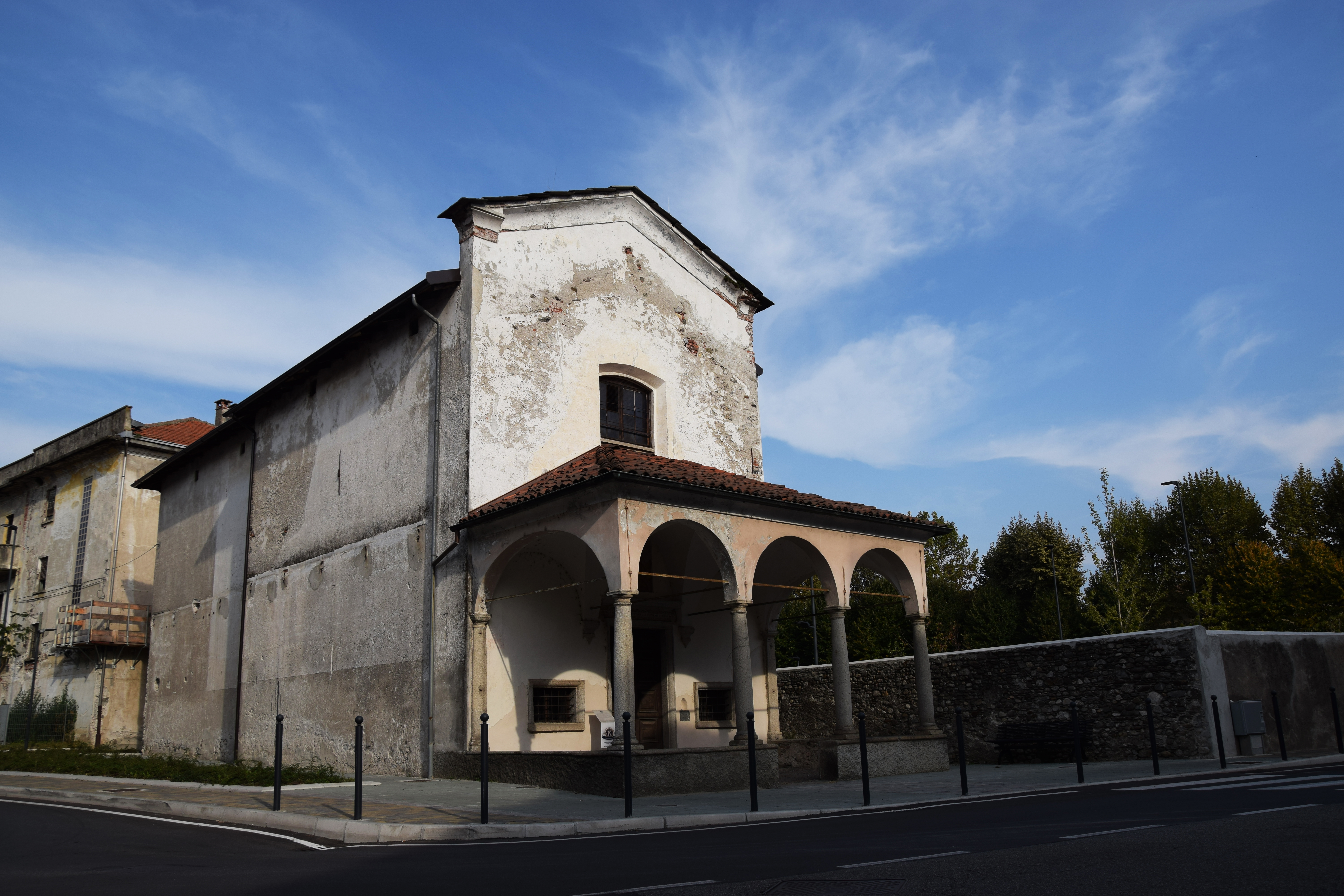 S.CATERINA This is a photo of a monument which is part of cultural heritage of Italy.